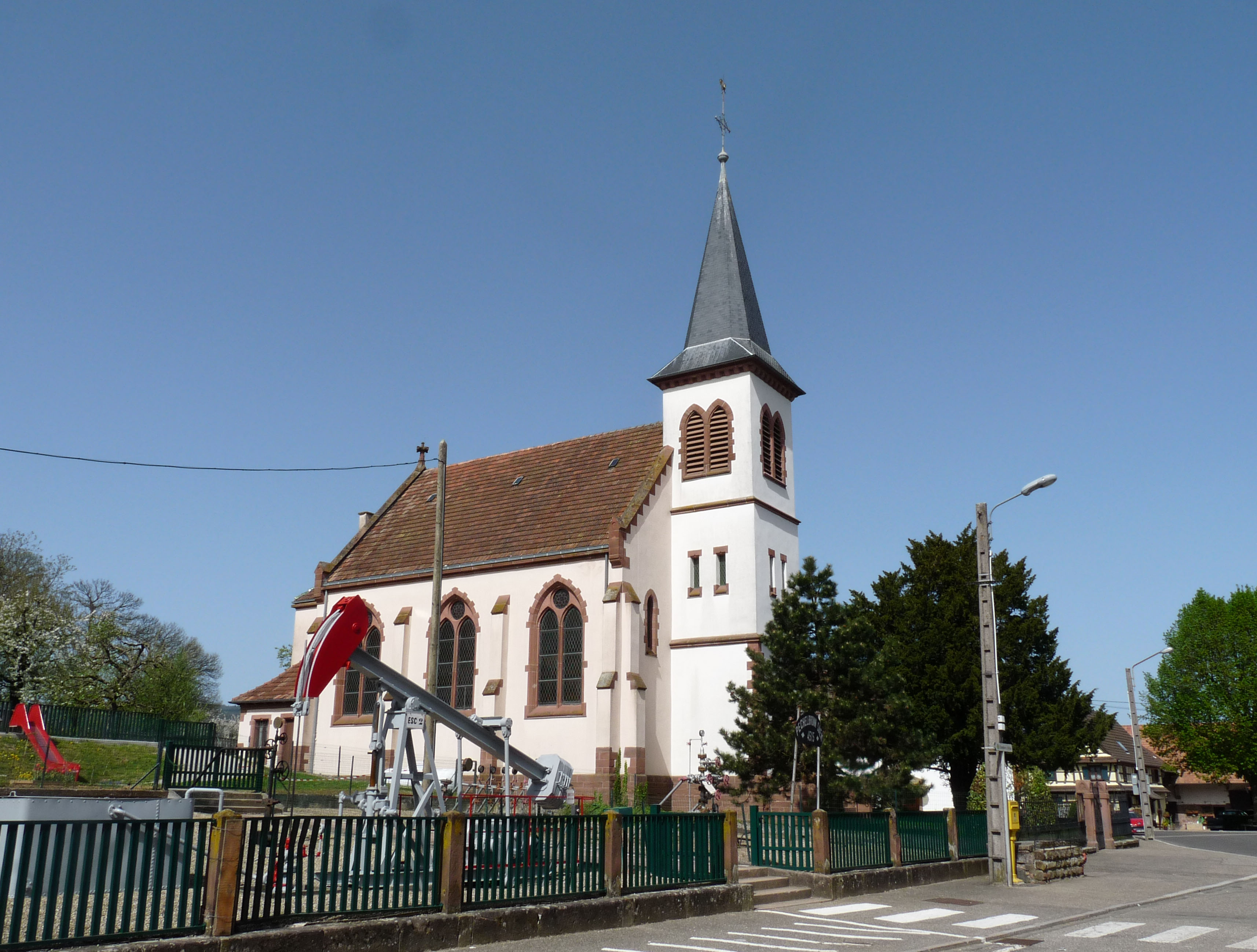 Eglise de Pechelbronn (Bas-Rhin)